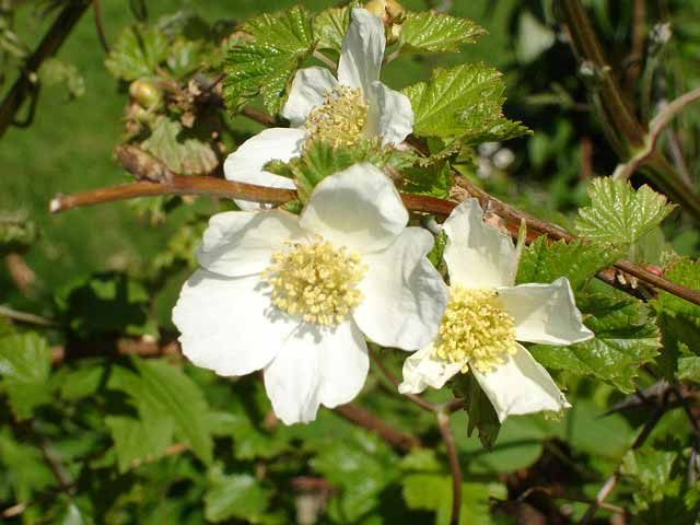 Rubus deliciosus